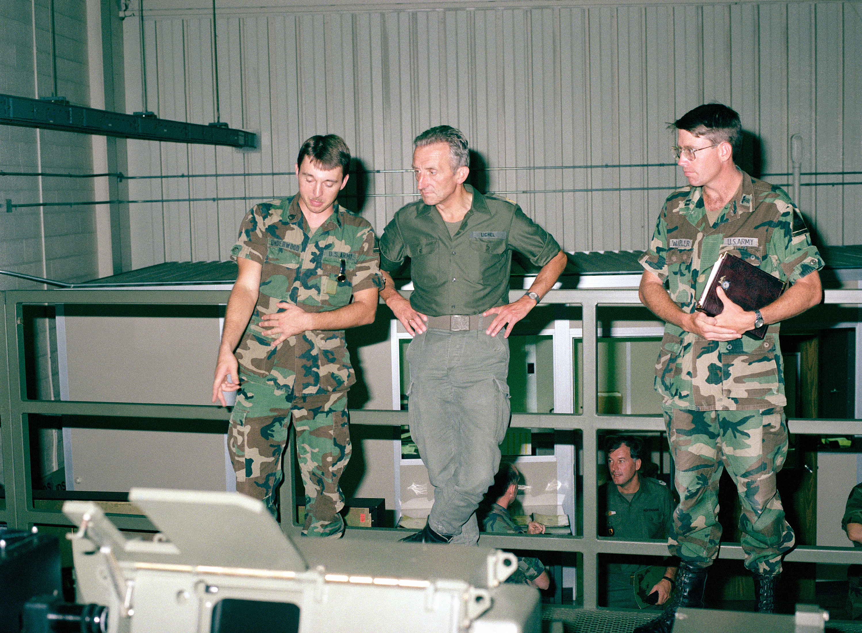 A soldier describes a piece of equipment to Major General Carl-Helmut Lichel, chief of Division V combat troops in the West German army during the general's visit to the US Army Armor Center